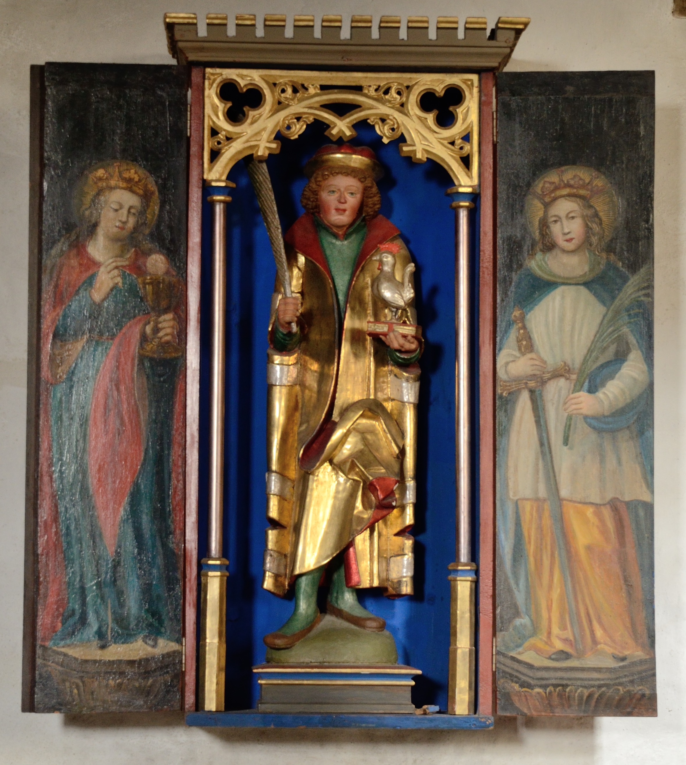 Aufsatz eines ehemaligen Veitsaltar in der St. Veitskirche (Veitsbronn) mit einer Holzskulptur des Heiligen Veit